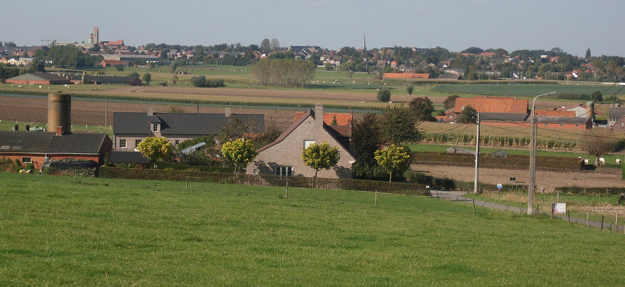 Zicht op de stad Tielt van aan de Poelberg - Poelbergstraat - Tielt - West-Vlaanderen - België